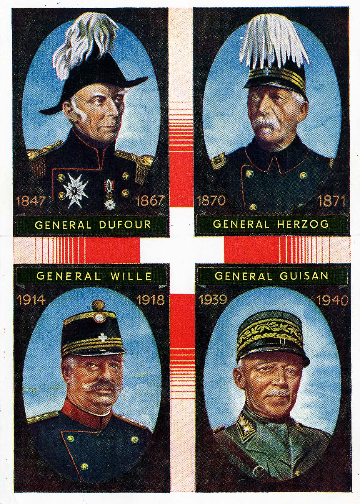 Porträt der Generäle Dufour, Herzog, Wille, Guisan.